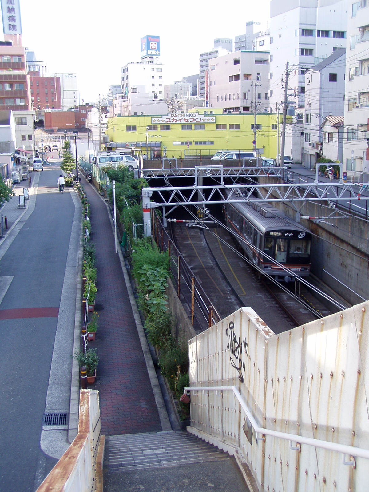 Osaka. Hankyu Senri Line near Tenjinbashisuji-rokuchome station.